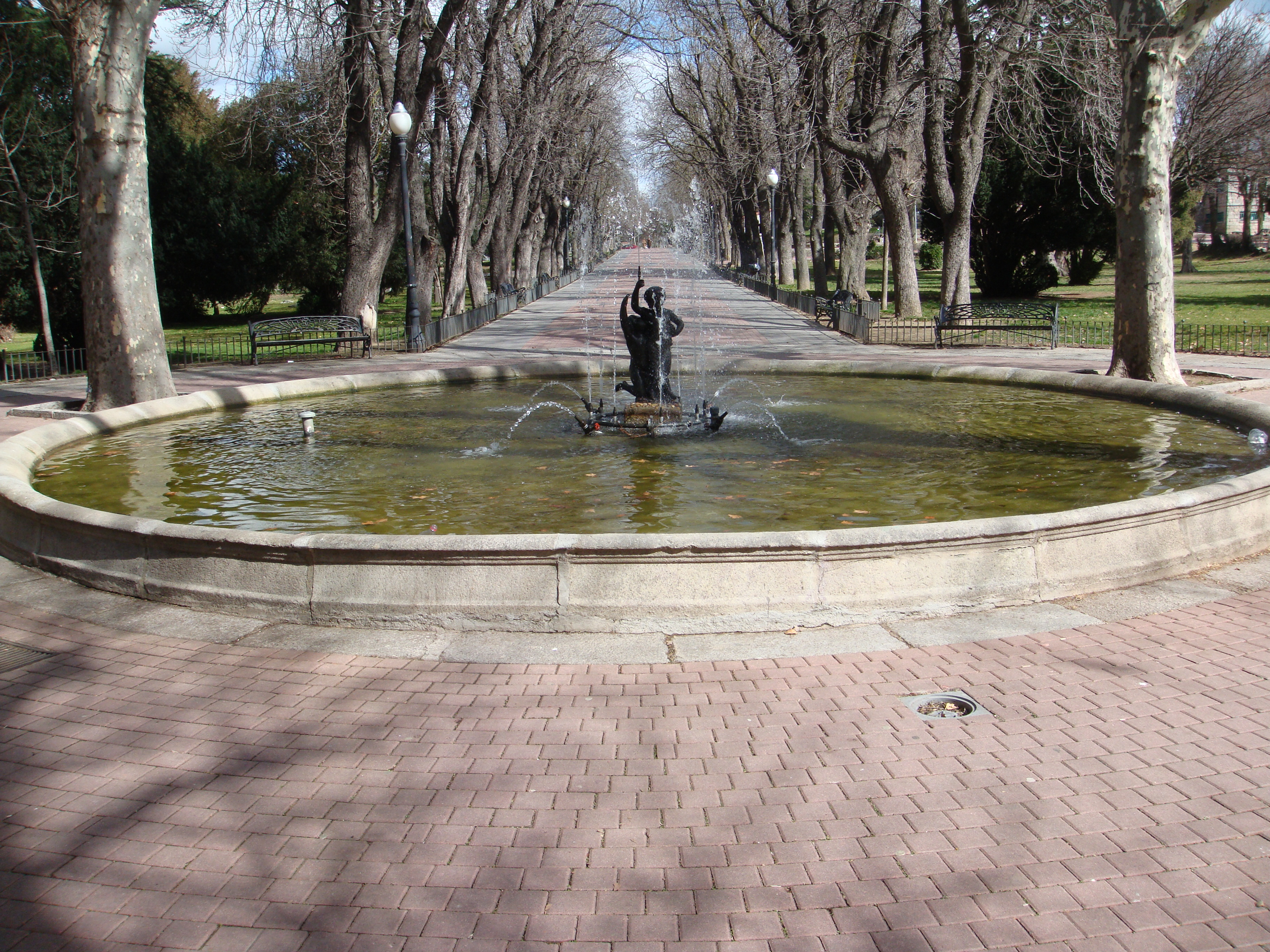 Fuente de los Angelitos, parque de San Antonio, Ávila, Spain.